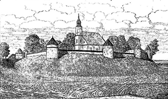 Беларуская (тарашкевіца): Зьнішчаныя бальшавікамі замак і кальвінскі збор у Койданаве